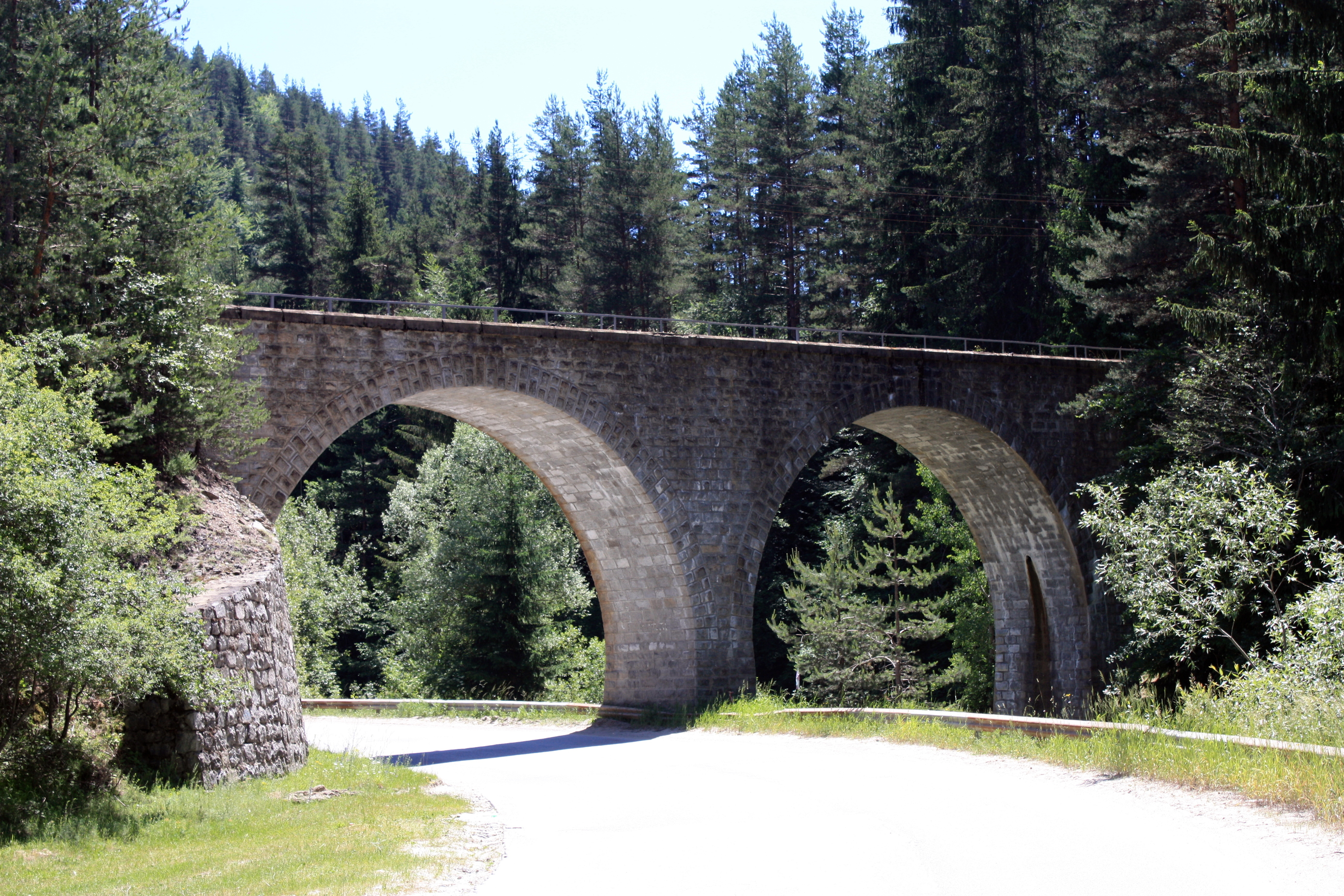 Viadukt am km 77,5 auf der Rhodopenbahn in Bulgarien. Es befindet sich zwischen den Stationen Smolewo und Tscherna Mesta. Die Brücke quert einen Bachlauf (rechts im Bild) und die Straße 84.